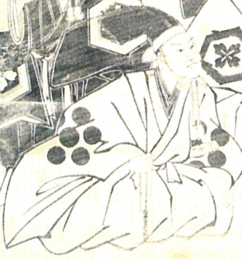 相馬樹胤の画像(「相馬家歴代藩主像」より)。